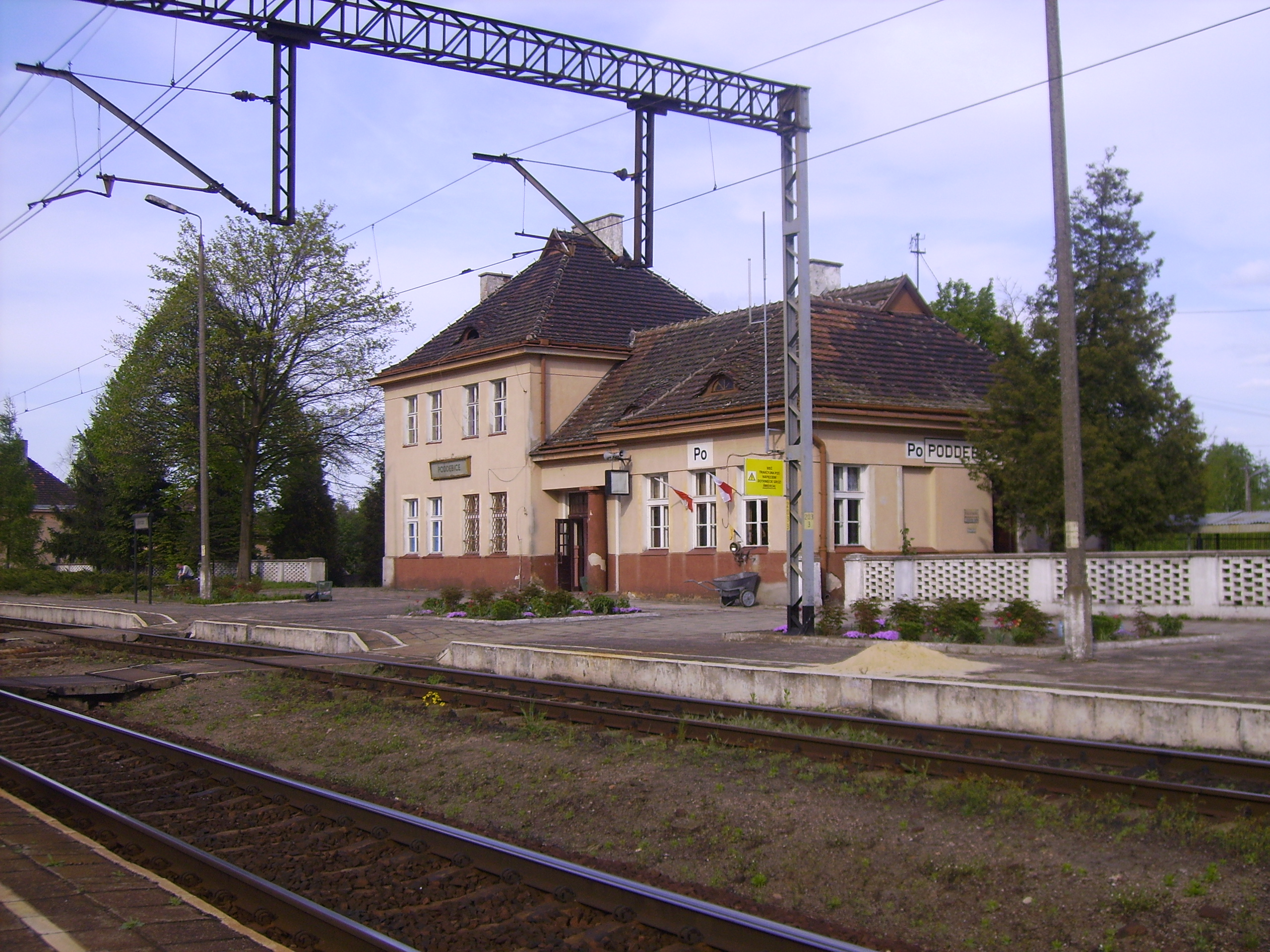 Dworzec PKP w Poddębicach